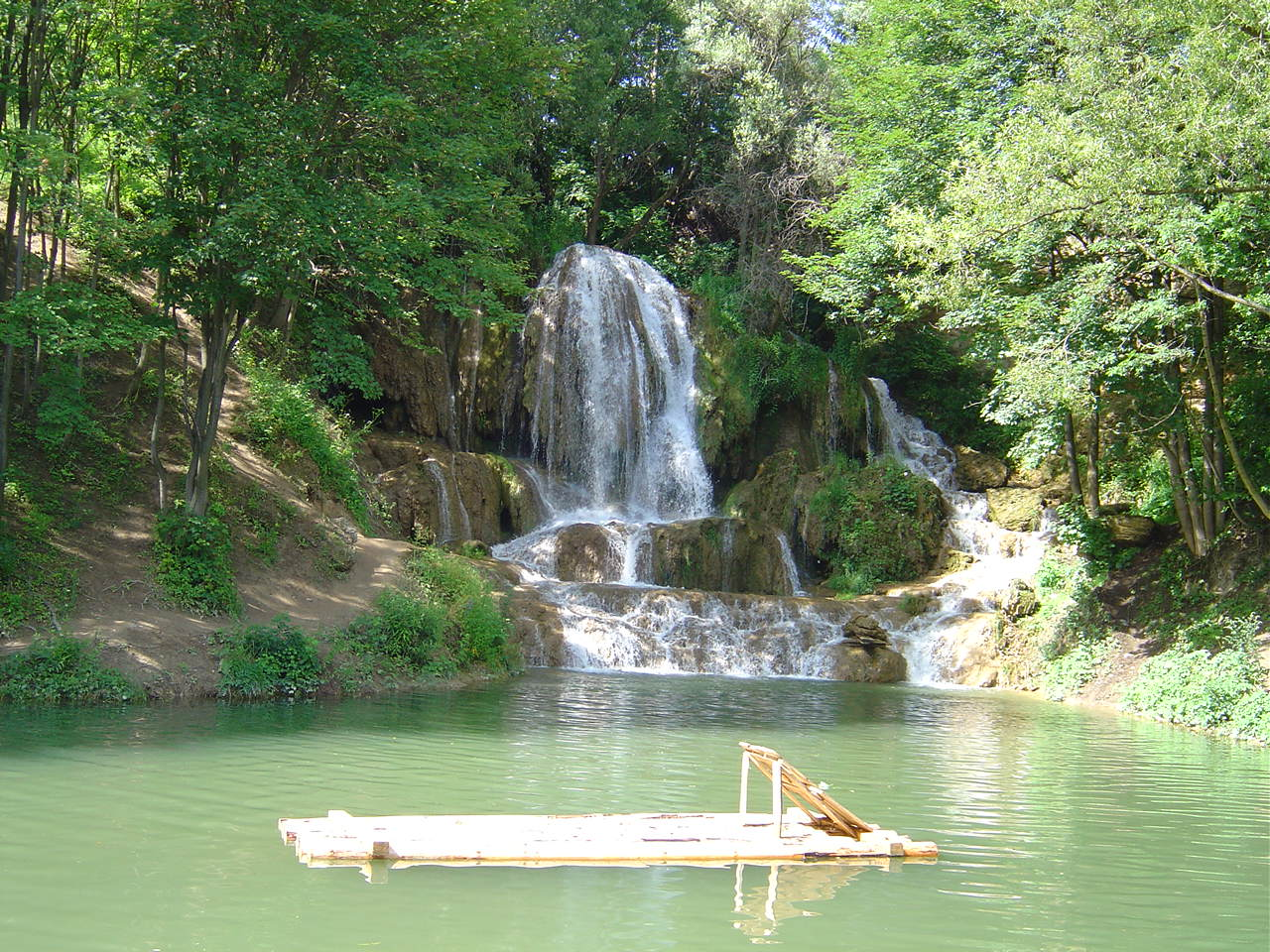 Lúčanský vodopád Obrázok odfotil Kristián Slimák.